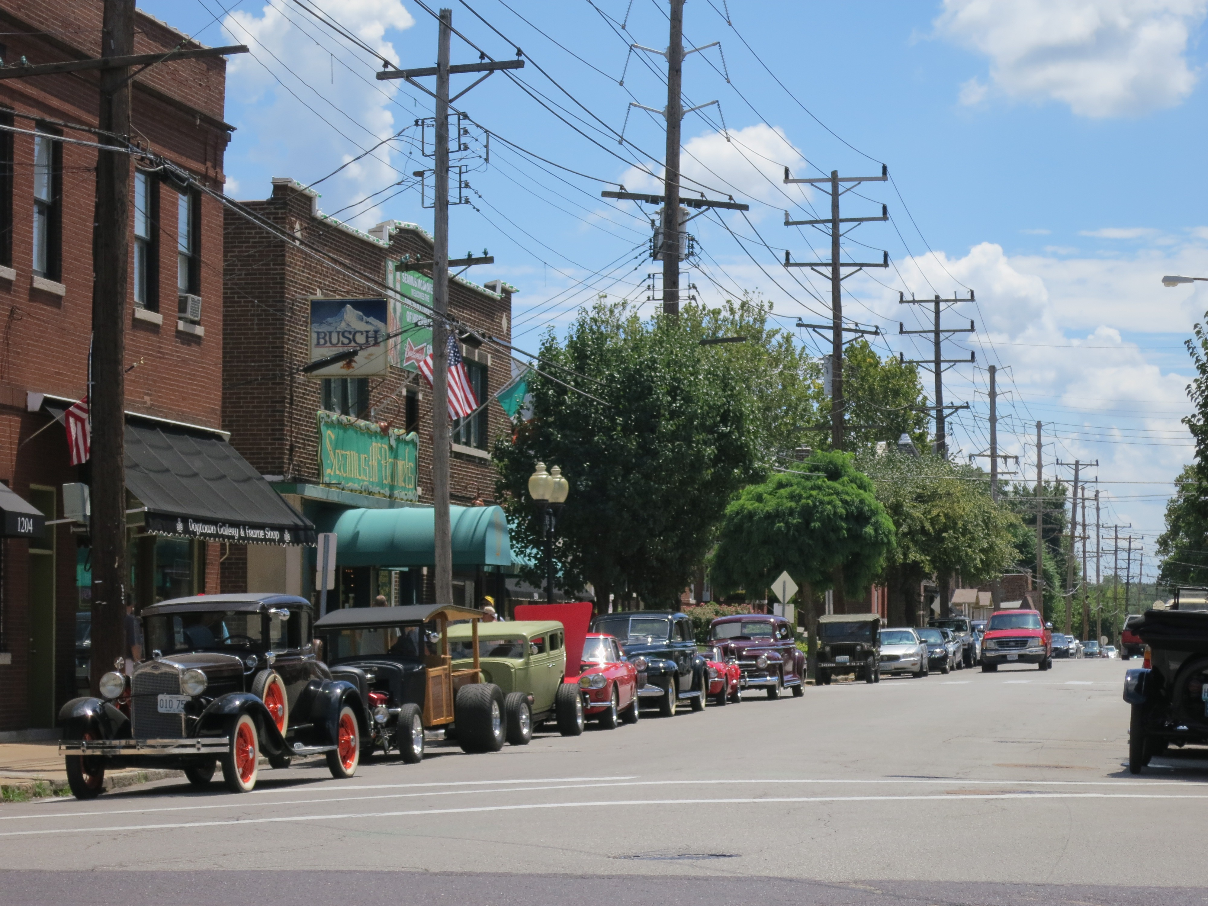 Tamm Avenue